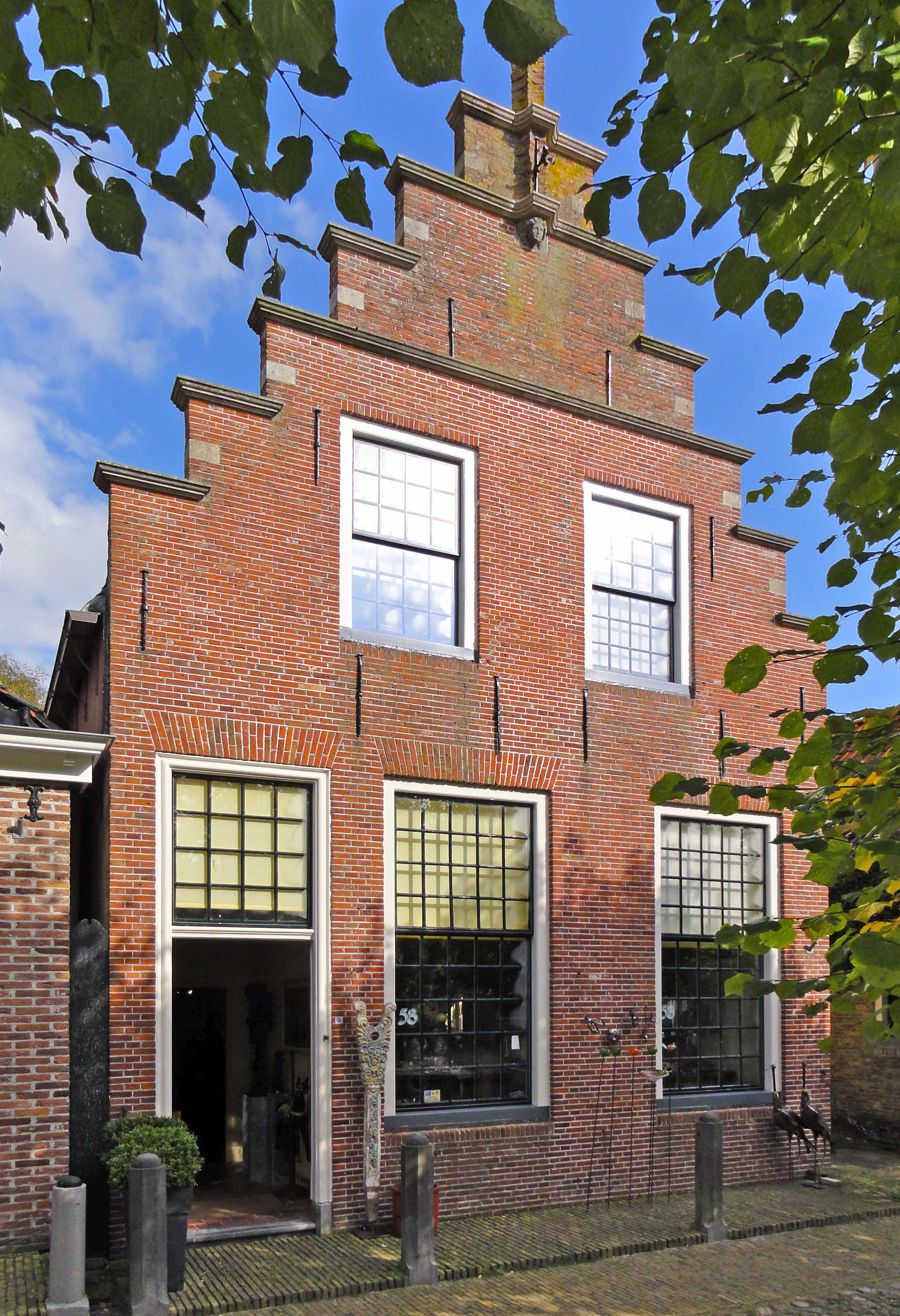 Heerenwal 58 in Sloten